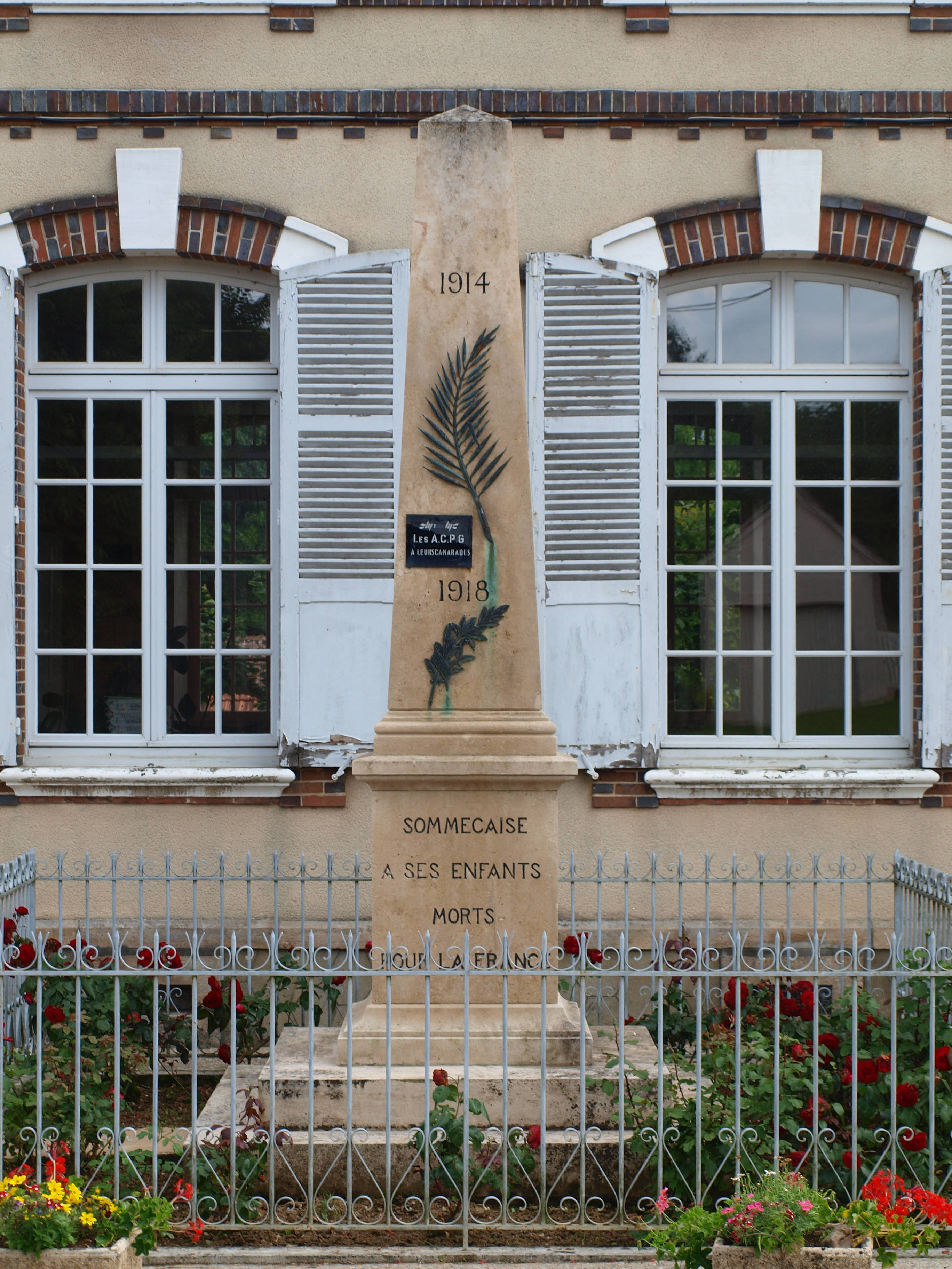 Sommecaise (Yonne, France) - le monument aux morts.